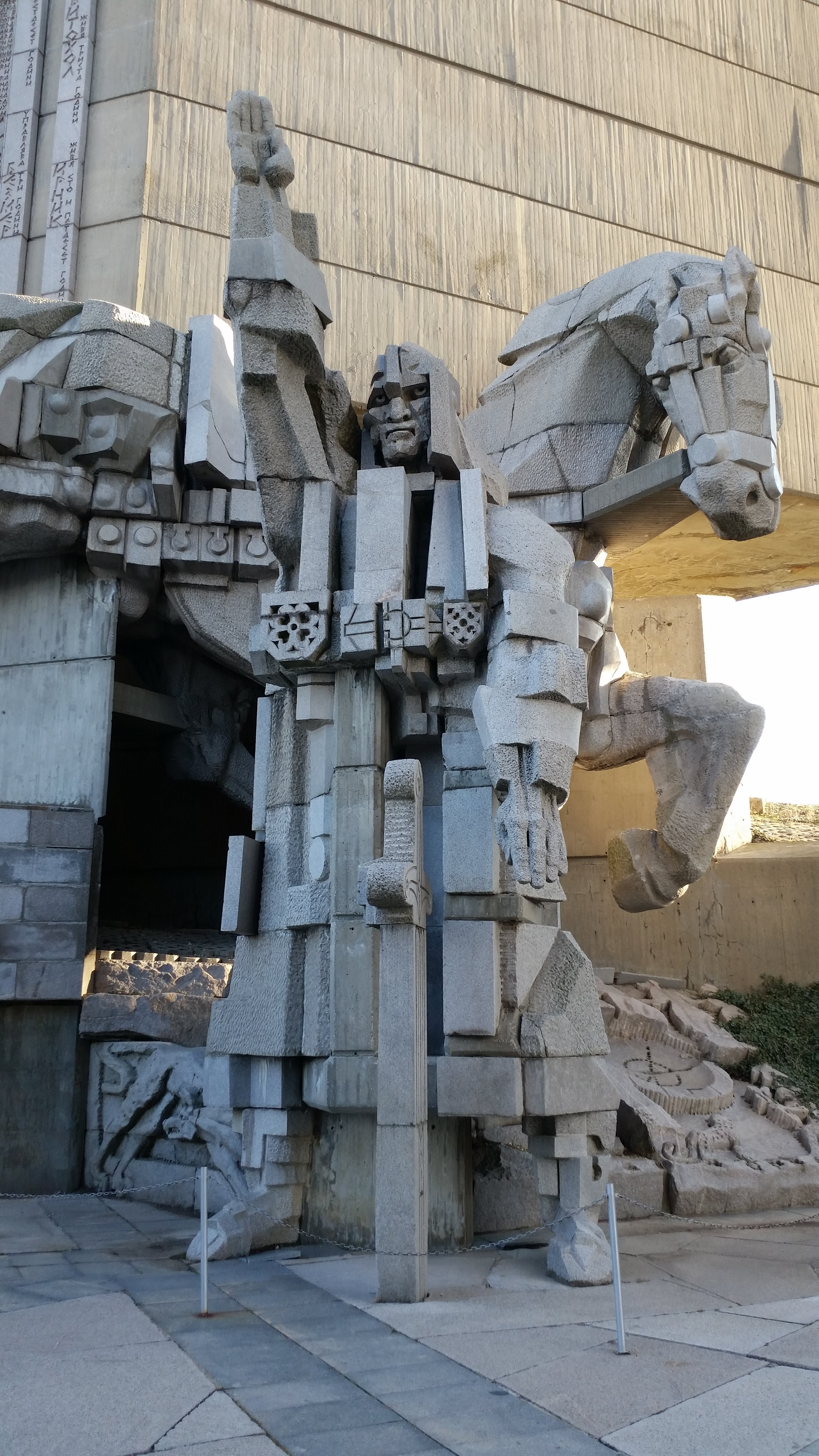 Se puede ver la estatua que en el interior conmemora el rey que clavó su espada para fundar el Estado Búlgaro.